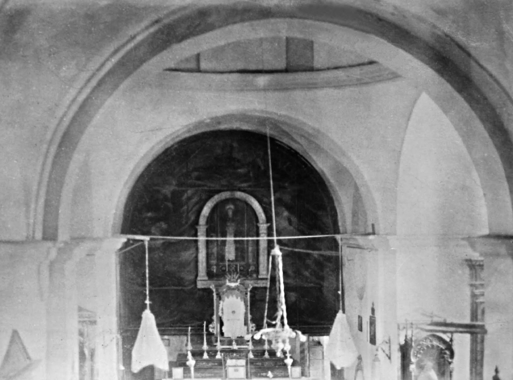 Vista de la ermita del Convento de Capuchinos desde la tribuna del extinguido coro. Fotografía obtenida por Fray Andrés de Palazuelo en 1924. Archivo provincial OFM Cap Provincia de España.